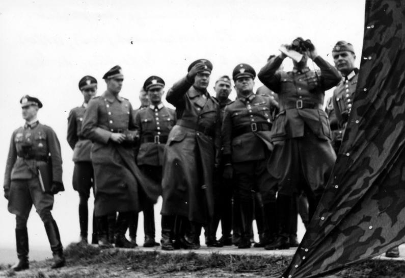 Generalleutnant Weisenberger, ein Erstürmer der Ft. [Festung] Douaumont (1916), erklärt dem Chef OP [Ordnungspolizei] und seiner Begleitung die Lage 1916 u. 1940. Generalleutnant Weisenberger mit Hand vor Mütze, rechts davor Generalmajor Jedicke [?] (BdO Wiesbaden), rechts Gen. Daluege (mit Karte und Fernglas)